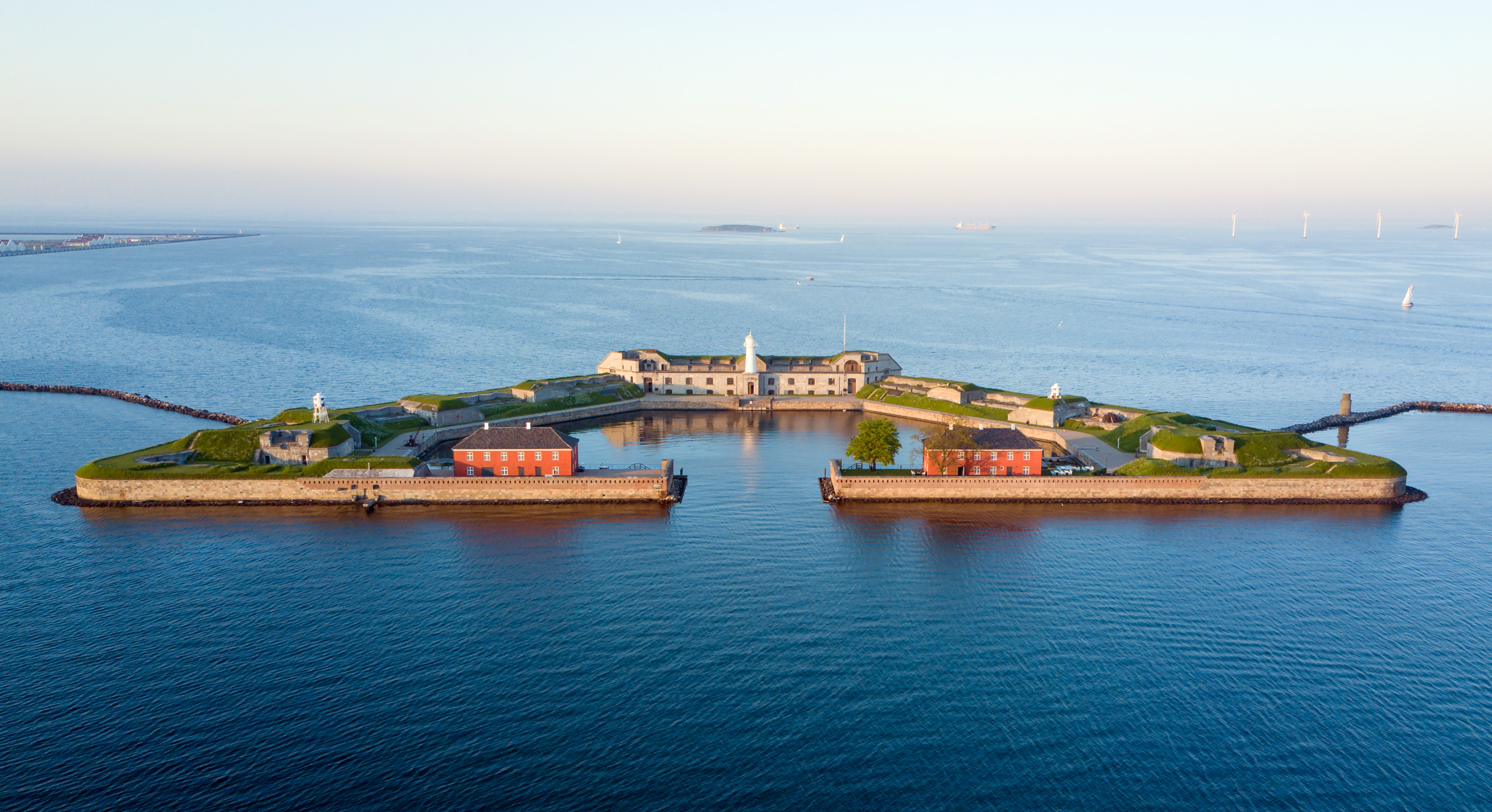 Trekroner in Copenhagen, Denmark